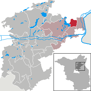 Parsteinsee in Brandenburg (Country) - District Barnim